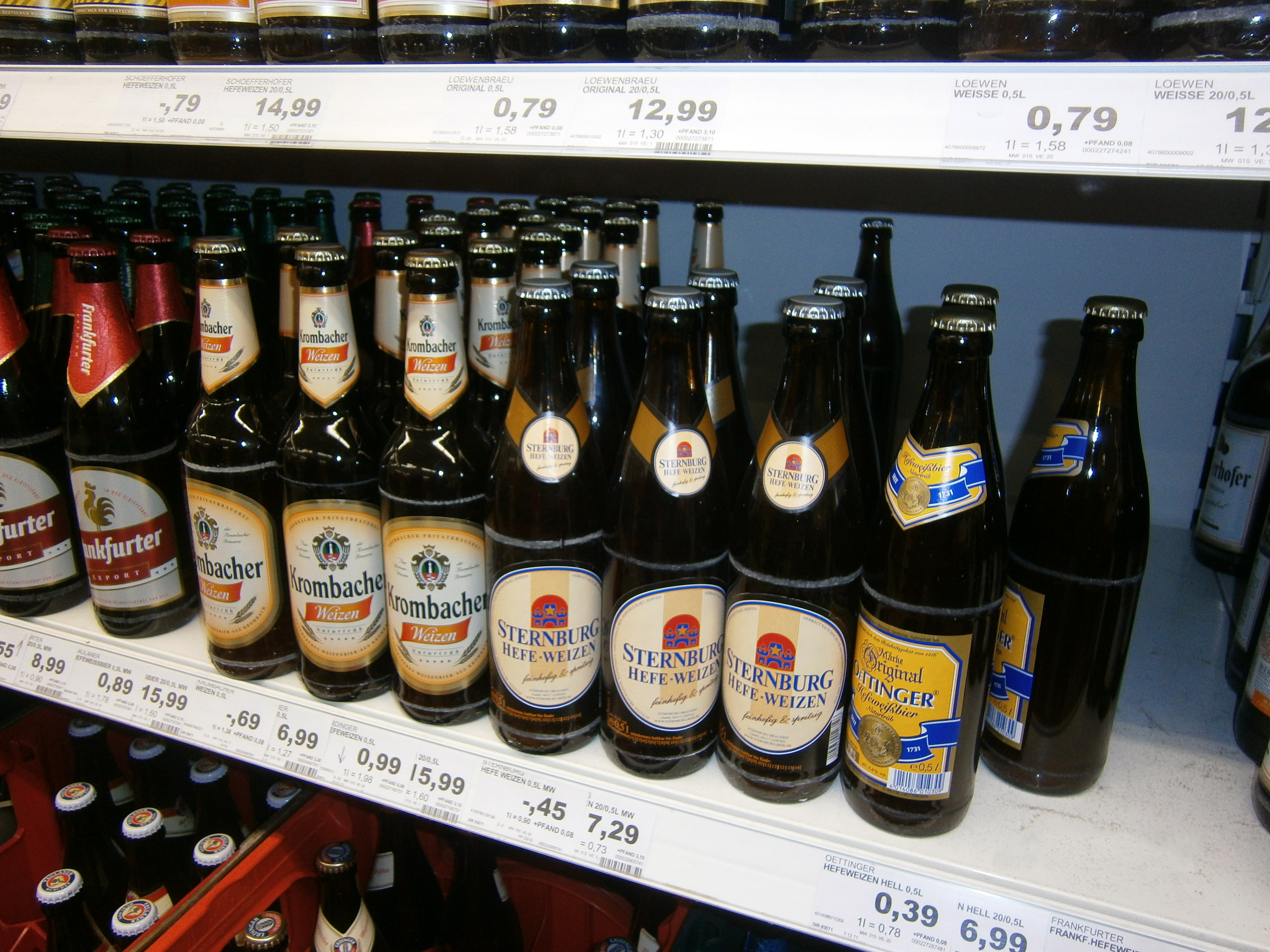 Deutsche Weizenbiere in der Kaufhalle. Weizen der Krombacher Brauerei in Kreuztal-Krombach. Hefe-Weizen der Sternburg-Brauerei Leipzig. Hefeweißbier naturtrüb der Öttinger Brauererei Gotha.